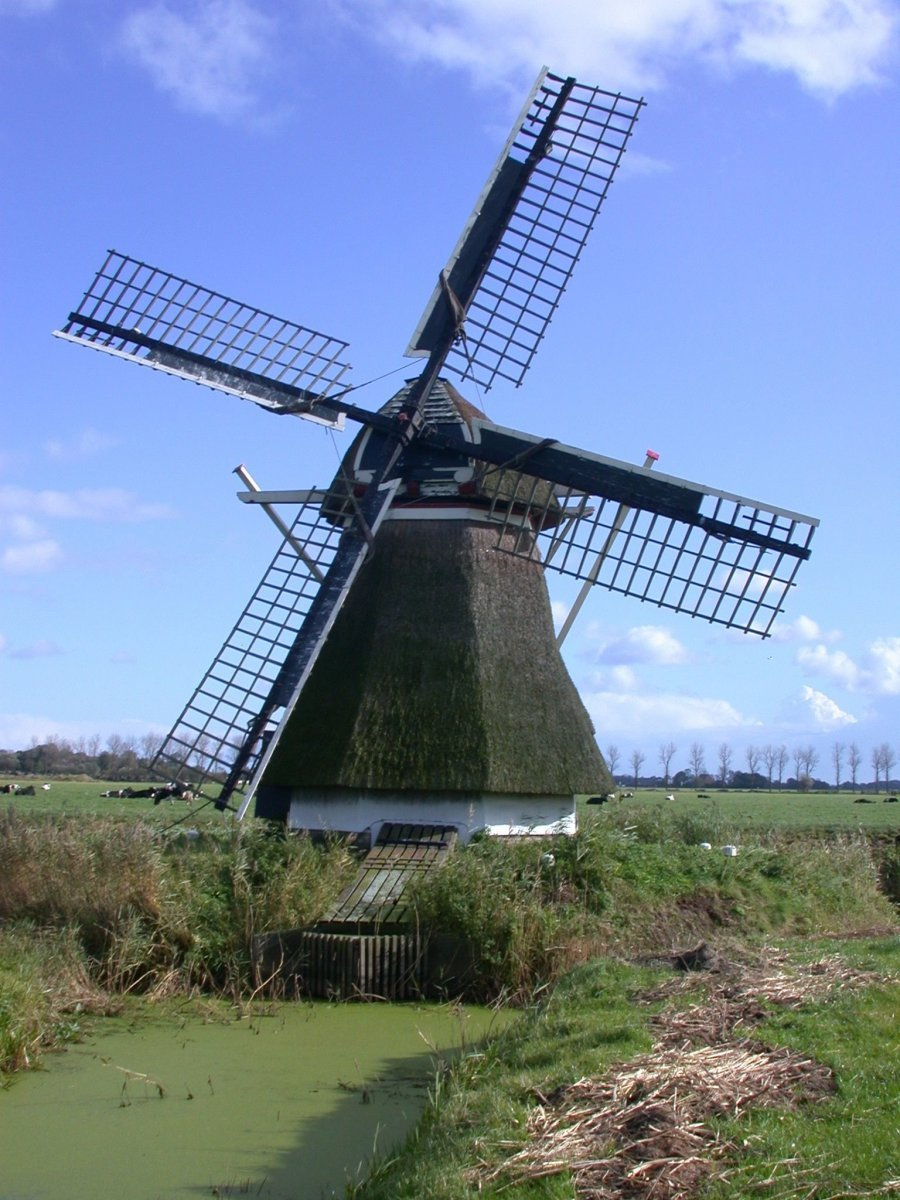 De Beintemapoldermolen/ Ten-Bruggencatenummer: 03230: Achtkante grondzeiler van voren gefotografeerd (opmerking: Foto gemaakt in het kader van het project Actualisering Monumentenregister (AMR).)